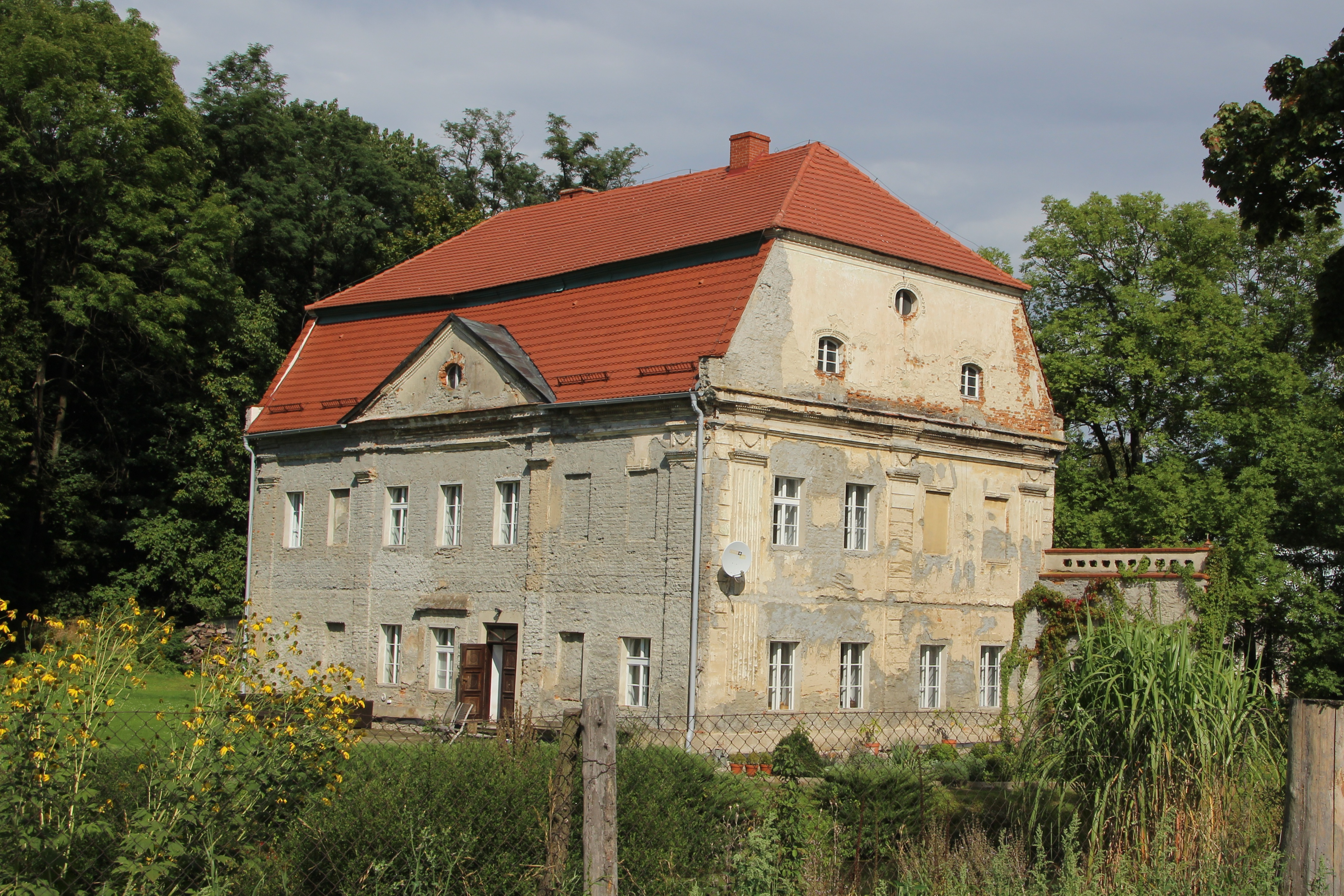 Siedlec – wieś w Polsce położona w województwie opolskim, w powiecie nyskim, w gminie Otmuchów.